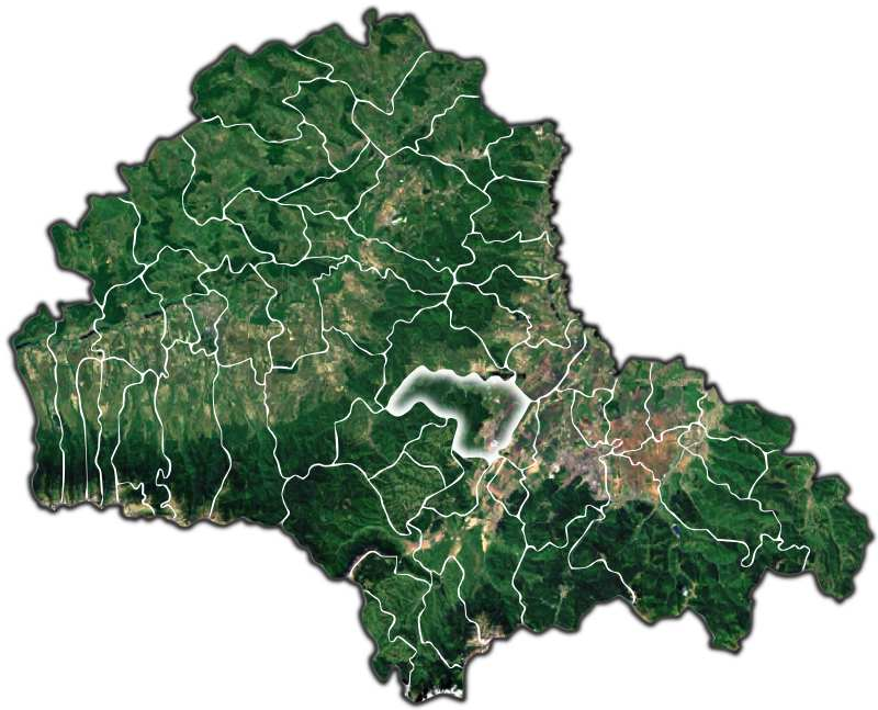 Codlea jud Brasov.